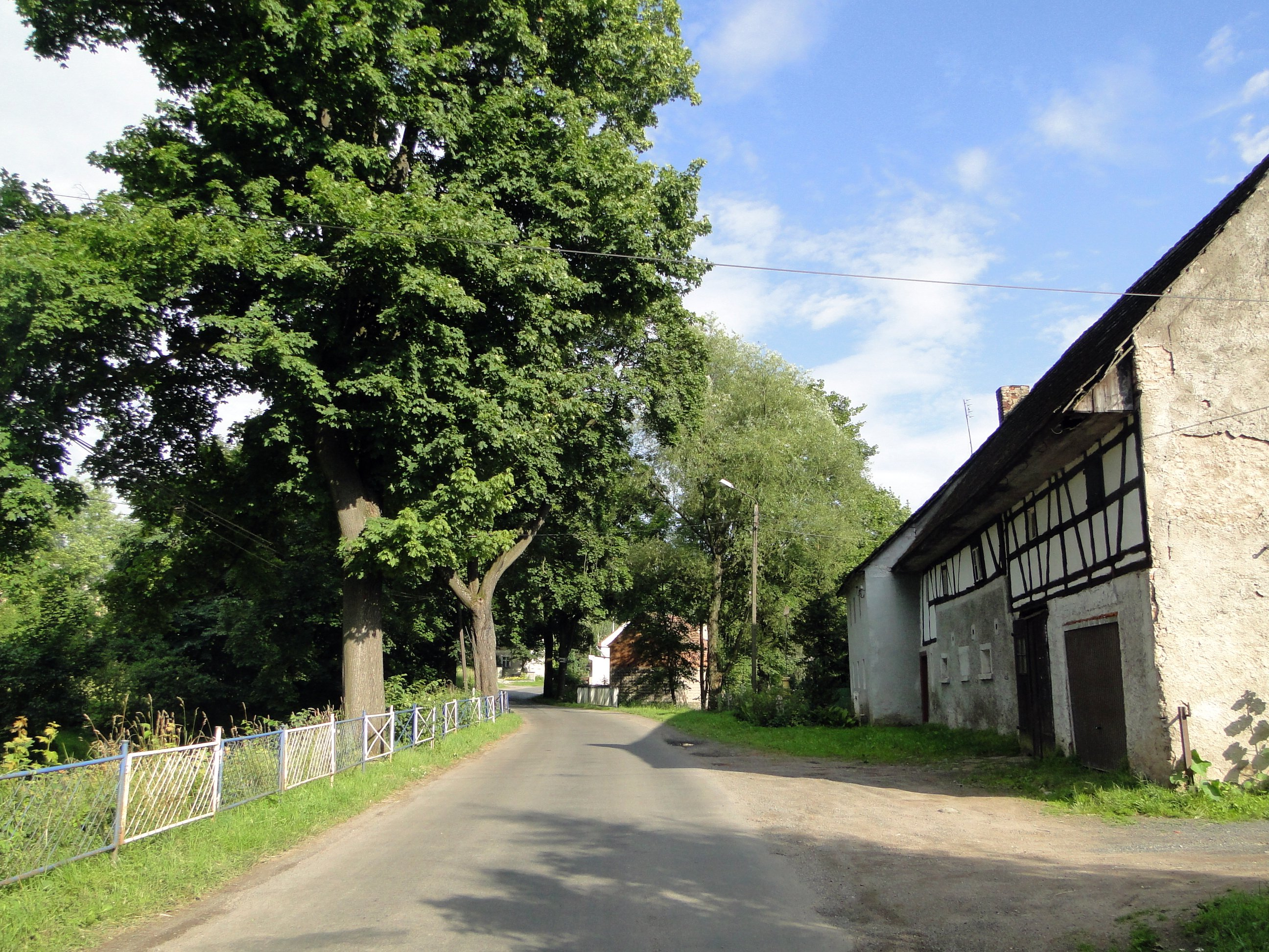 Widok wsi